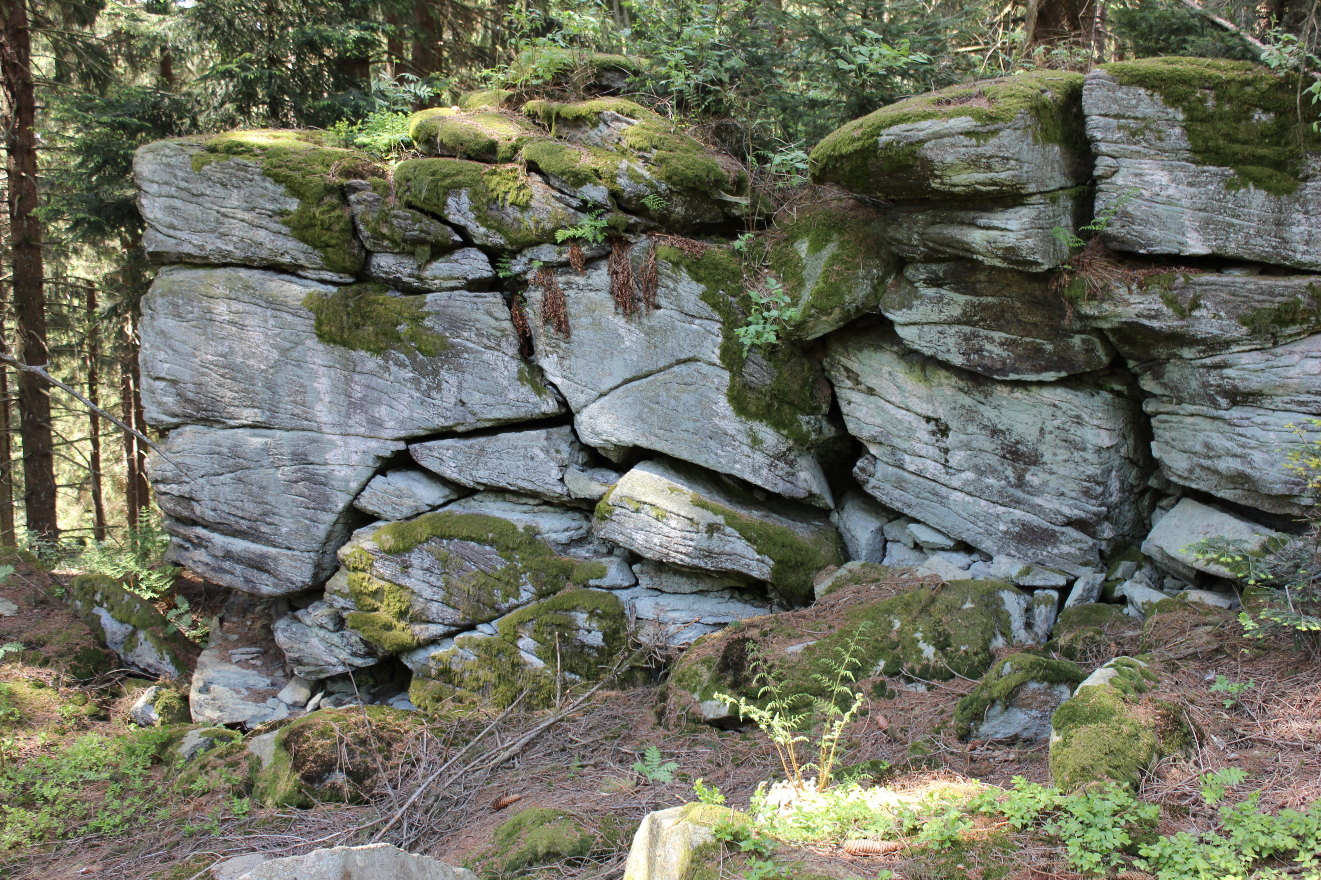 Felsformation am Gipfel des Bernhardsnagel, 894 m. Der Bernhardsnagel liegt im Gemeindebereich von Rattenberg und gehört zu den Geotopen im Landkreis Straubing-Bogen mit der Nr. 278R008